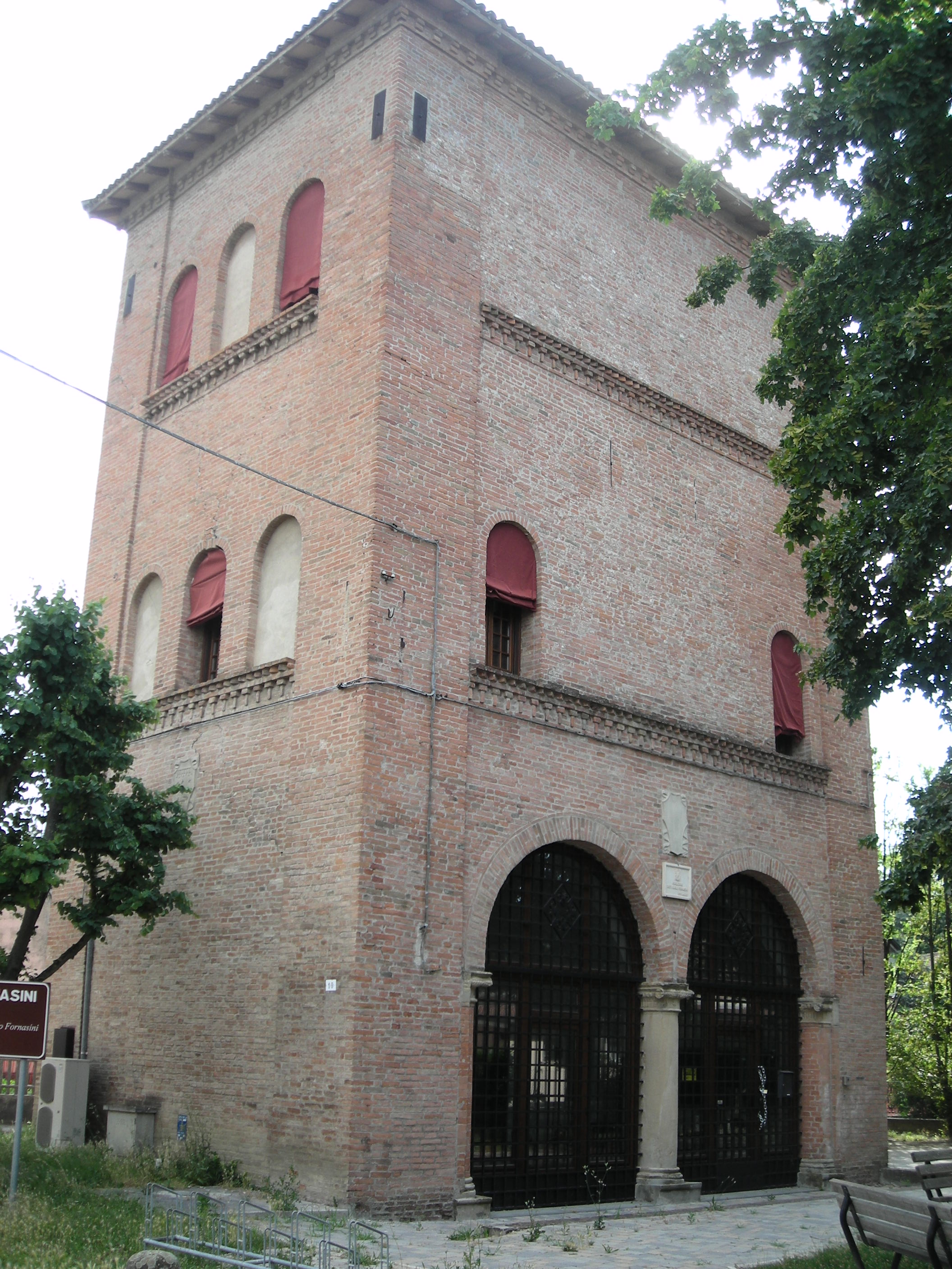 Torre del Poggio, detta anche dell'Ortolano o Fornasini